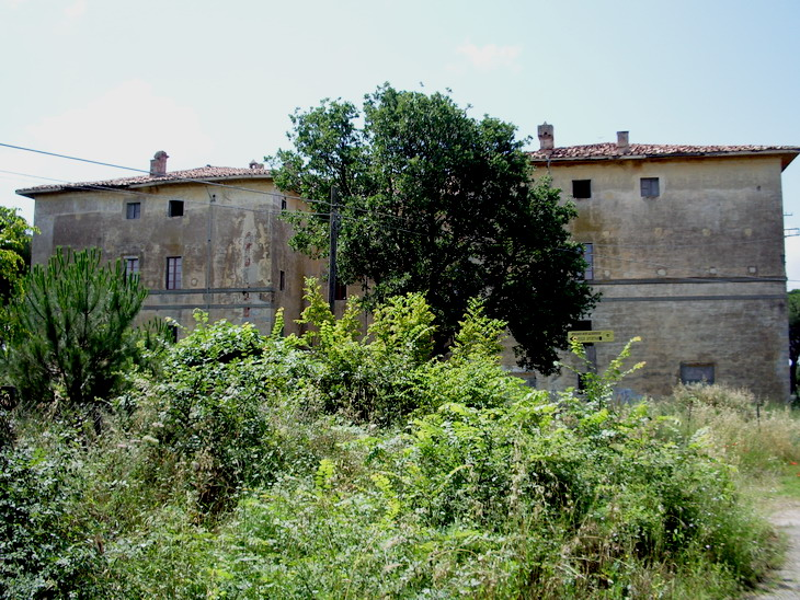 Facciata posteriore del Palazzo del Chiarone (Dogana pontificia del Chiarone) a Capalbio (GR)